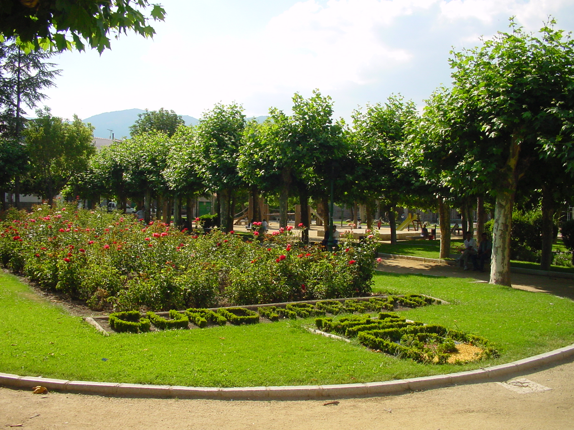 Parque en piedra en Guadarrama.